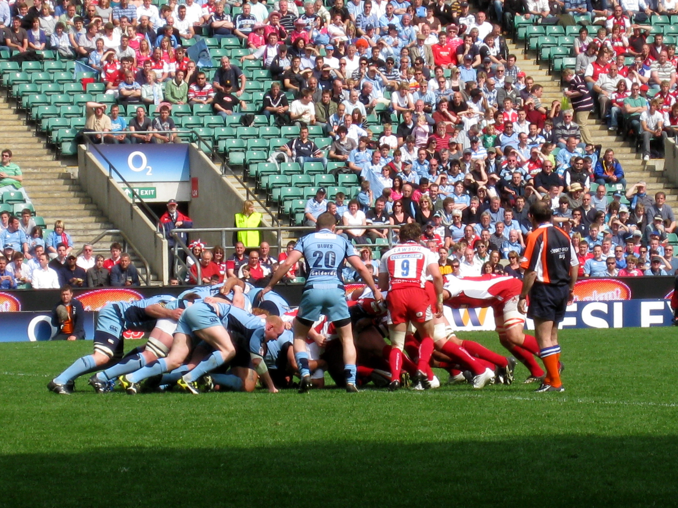 Gloucester et les Cardiff Blues en Coupe anglo-galloise en finale en avril 2009 au stade de Twickenham. Prise le 18 avril 2009. Gloucester Rugby and Cardiff Blues in final cup in Twickenham stadium. 18 April 2009.